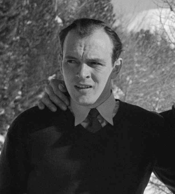 Gunnar Eriksson